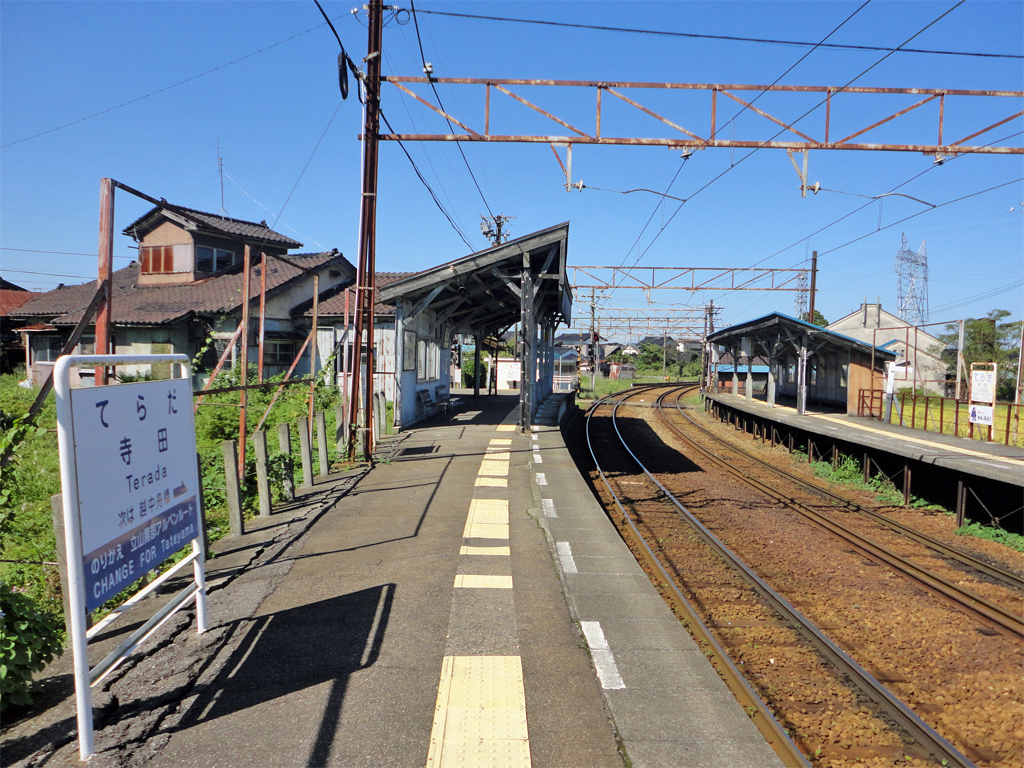 富山地方鉄道寺田駅 ホーム（本線）